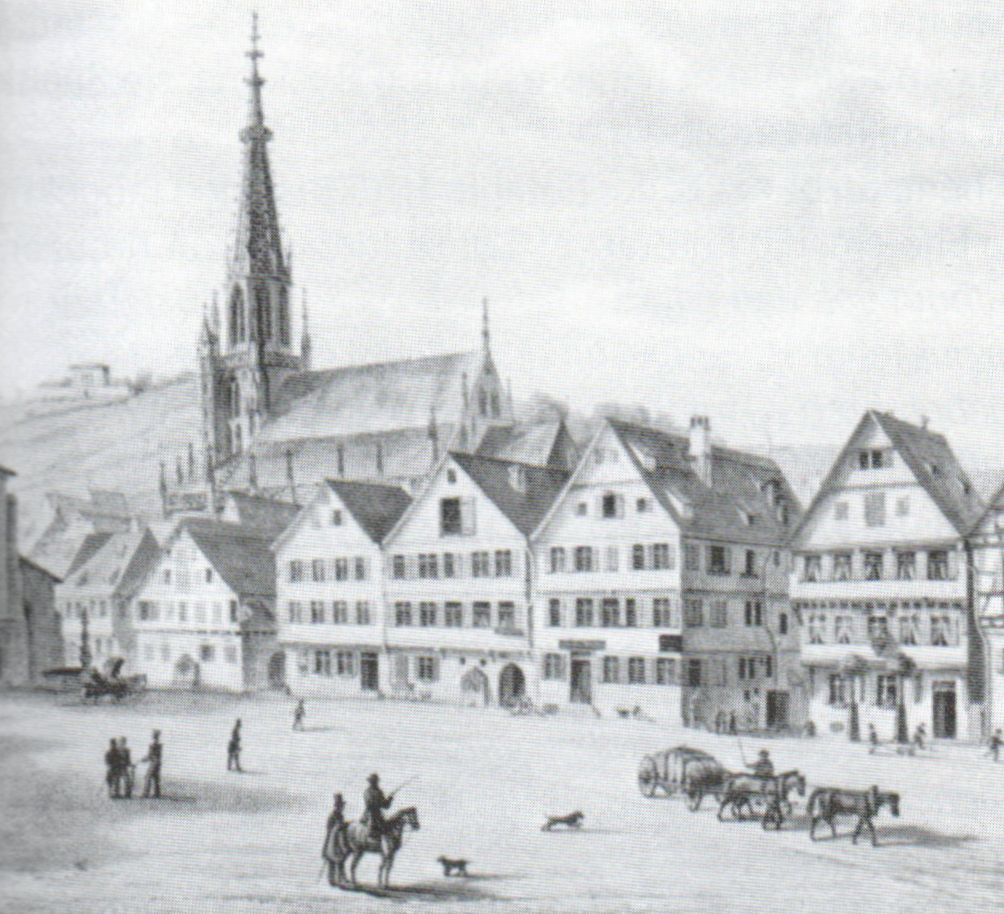 Esslingen, Marktplatz und Frauenkirche. Der Reiter im Vordergrund ist Carl Jakob Christian Weiß. Vor seinem Haus spielen seine drei Kinder. Lithographie